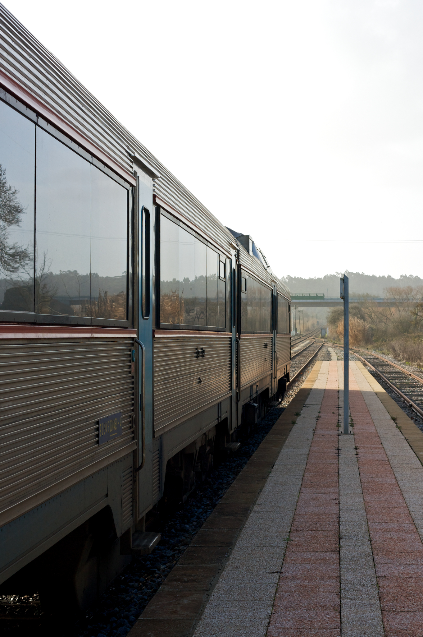 Tipo: Comboio Regional 6453/2 [Caldas da Rainha - Figueira da Foz] Local: Estação de Monte Real [Linha do Oeste, PK 172] Data e hora: 24 de Janeiro de 2009 [10h01] Material: Automotora 0469 [Unidade Dupla Diesel]